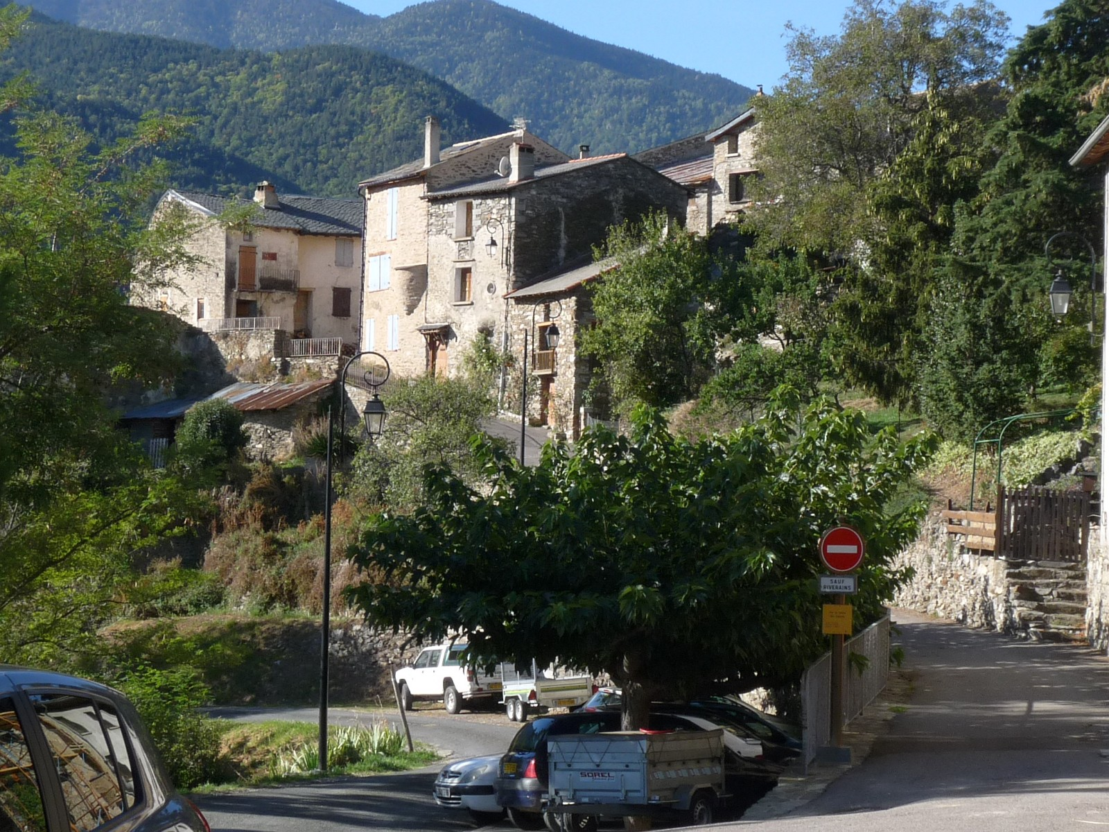 Entrée du bourg de Canaveilles , Pyrénées-Orientales, France